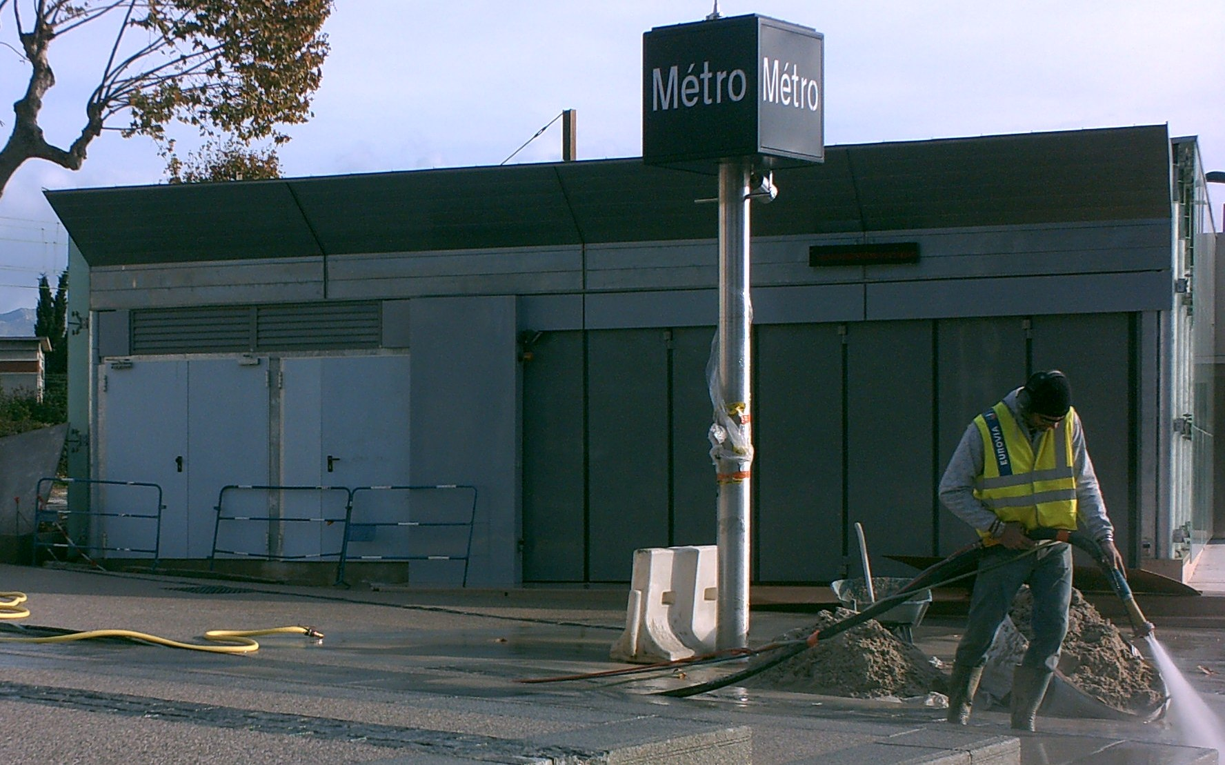 Édicule de la station La Blancarde avant l'inauguration.